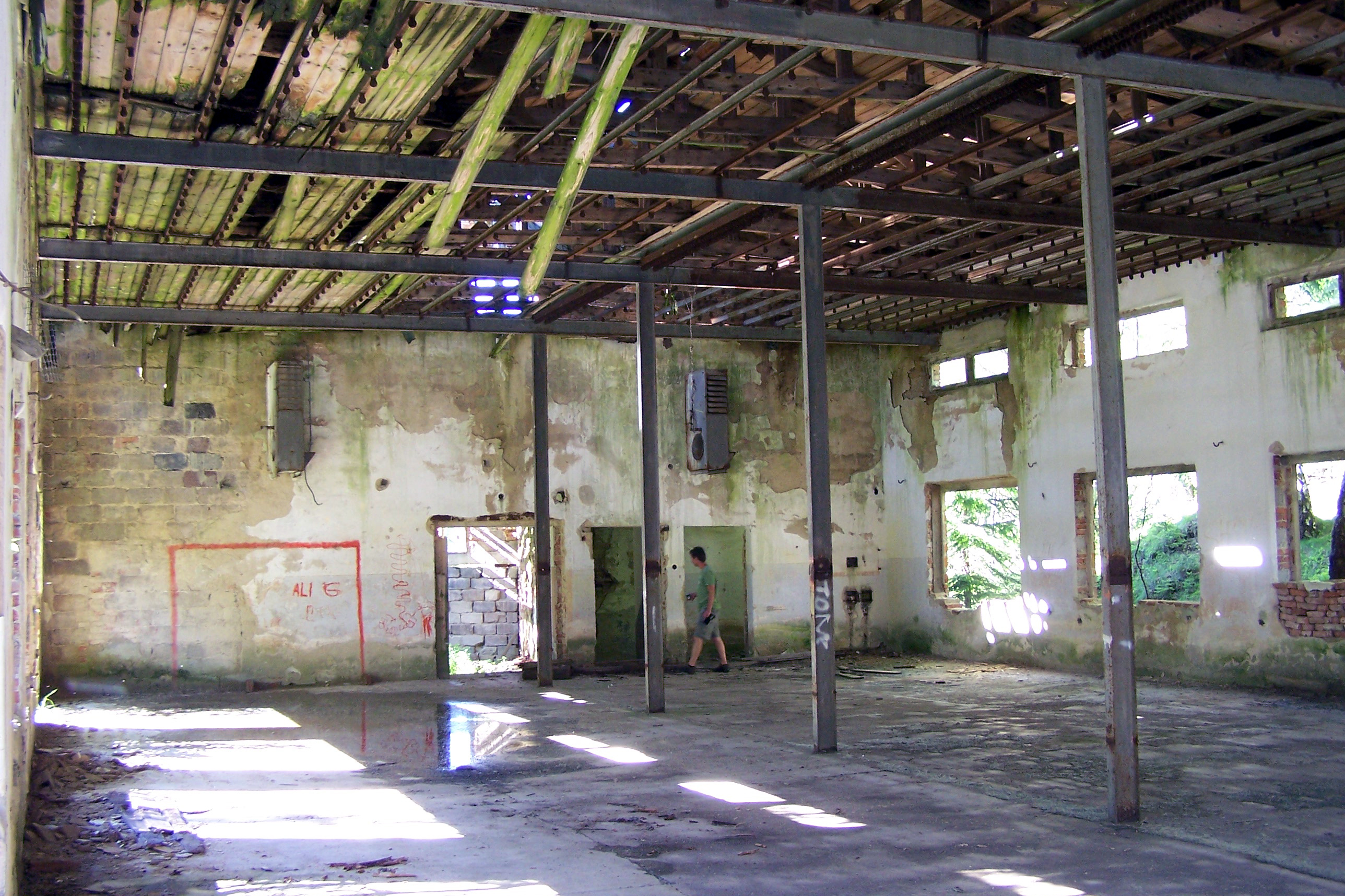 Bývalý pracovní tábor Rovnost – původní budova převlékárny.